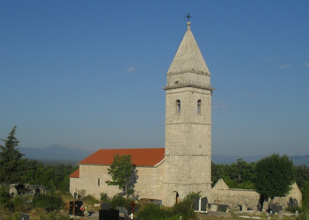 Храм СПЦ Св. апостола Петра и Павла у Биовичином Селу, Далмација